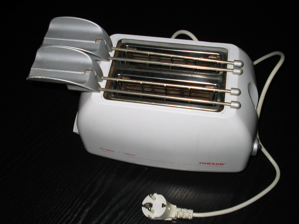 broodrooster / toaster